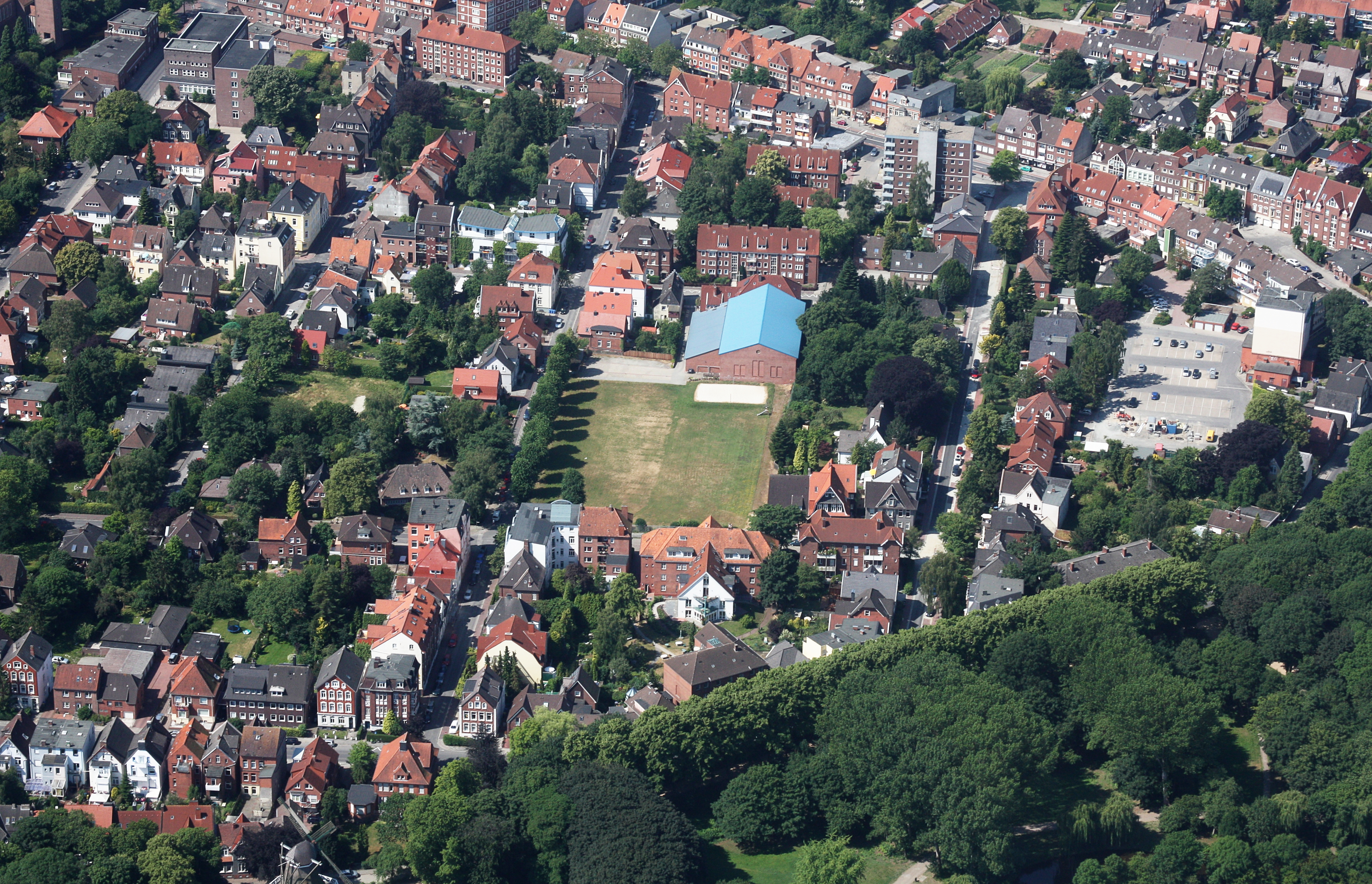 Flug über Emden; Flughöhe 1500 ft; Juli 2010; Originalfoto bearbeitet: Tonwertkorrektur und Bild geschärft mit Hochpassfilter